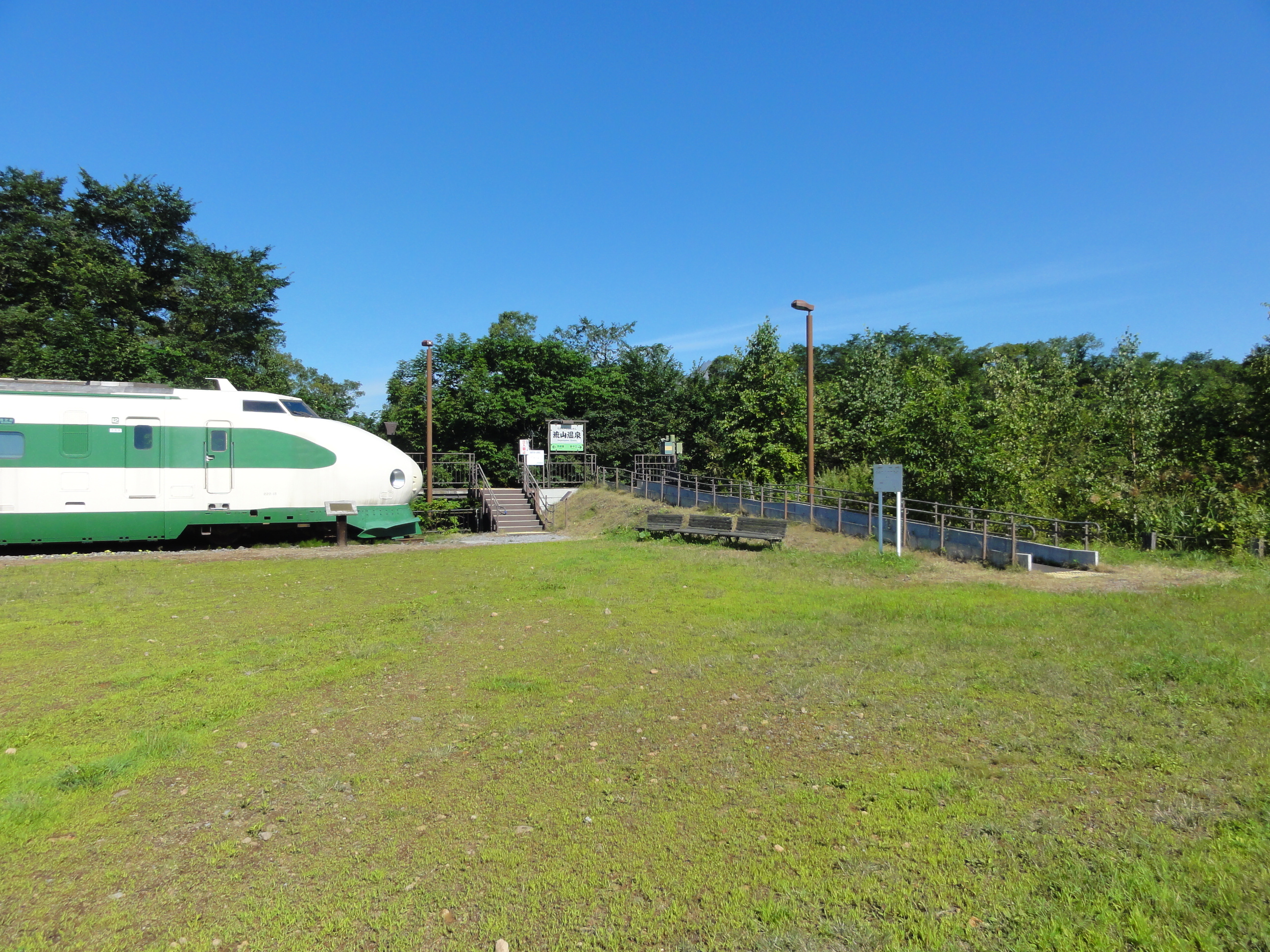 JR北海道流山温泉駅